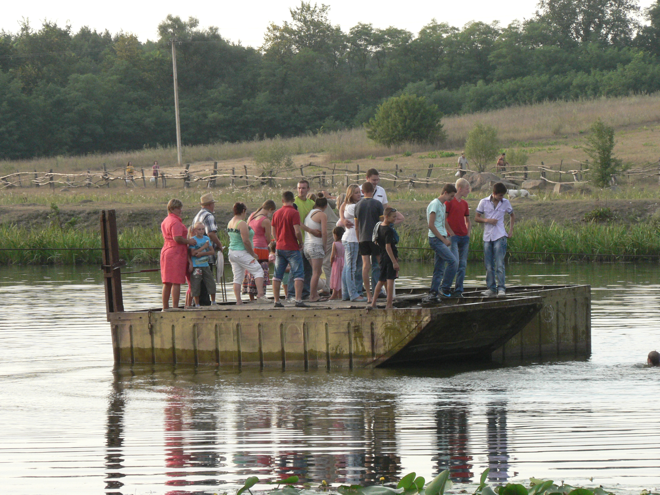 Пором через Південний Буг в Канаві